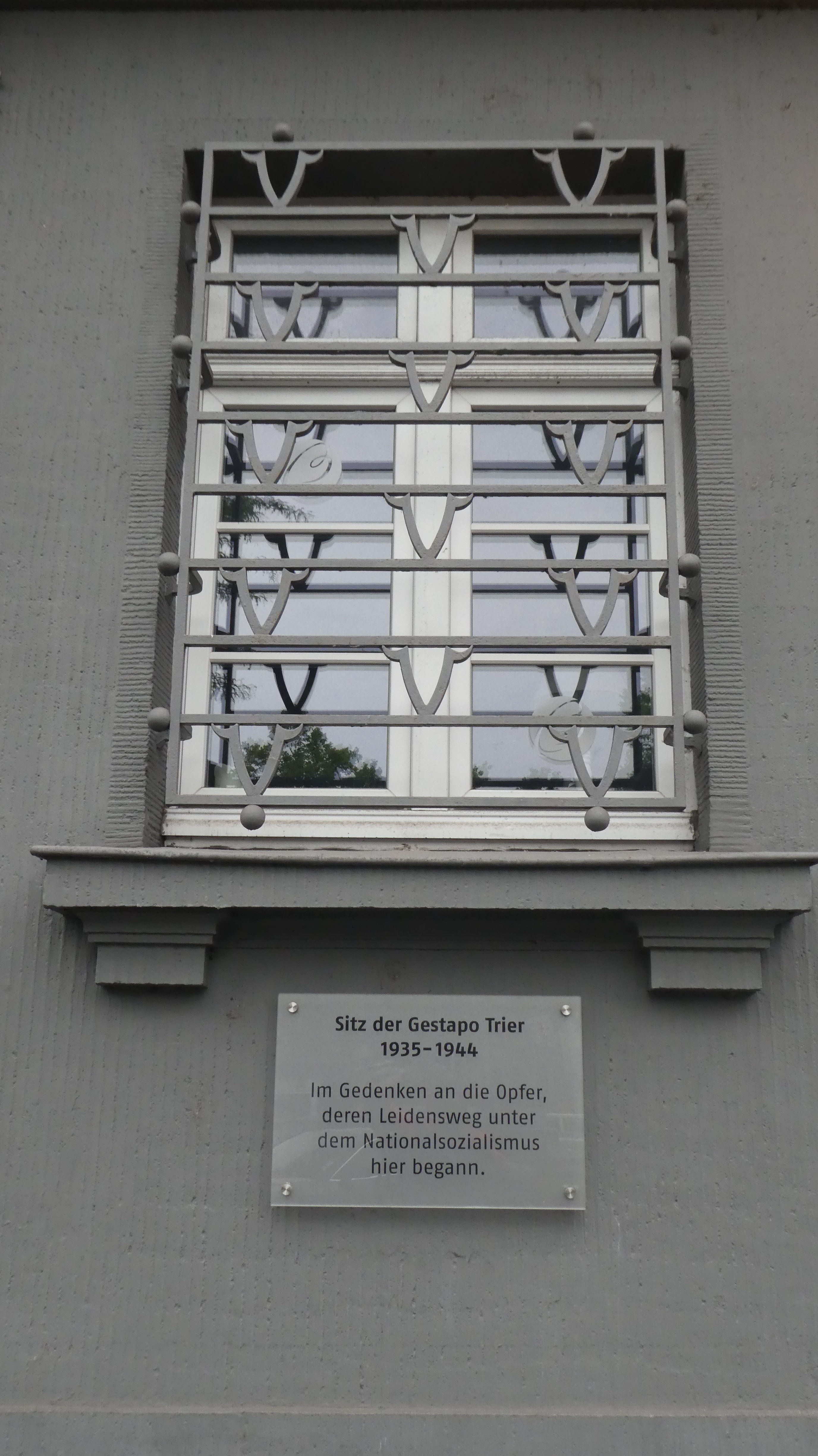 Inschrift: Sitz der Gestapo Trier 1935-1944 Im Gedenken an die Opfer, deren Leidensweg unter dem Nationalsozialismus hier begann.